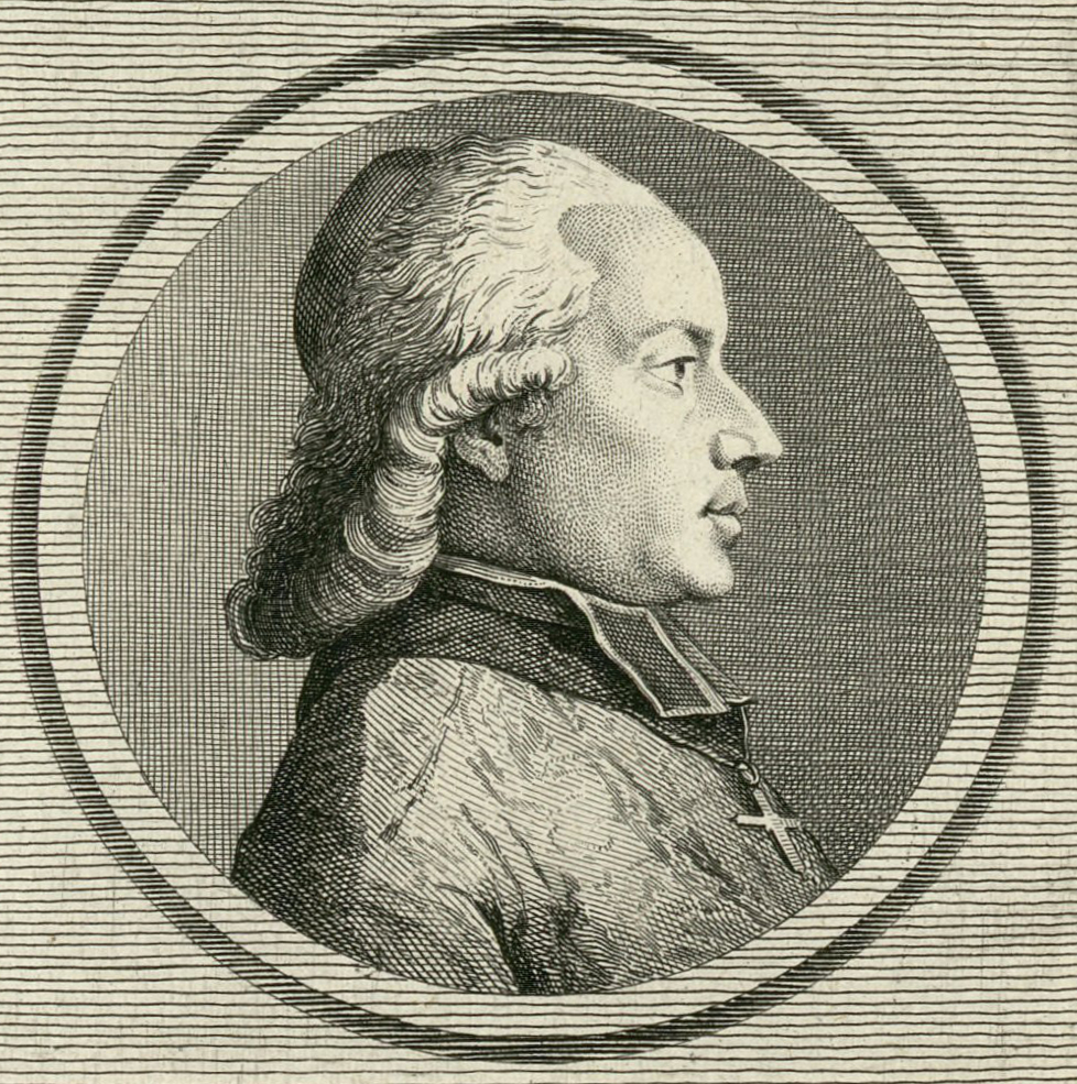 Anne-Louis-Henri de La Fare: né à Luçon en Bas Poitou le 9 September 1752, évêque de Nancy le 13 January 1788, a prêché à la messe de St Esprit célébrée pour l'ouverture des Etats Généraux. Député du clergé de Nancy à l'Assemblée nationale de 1789